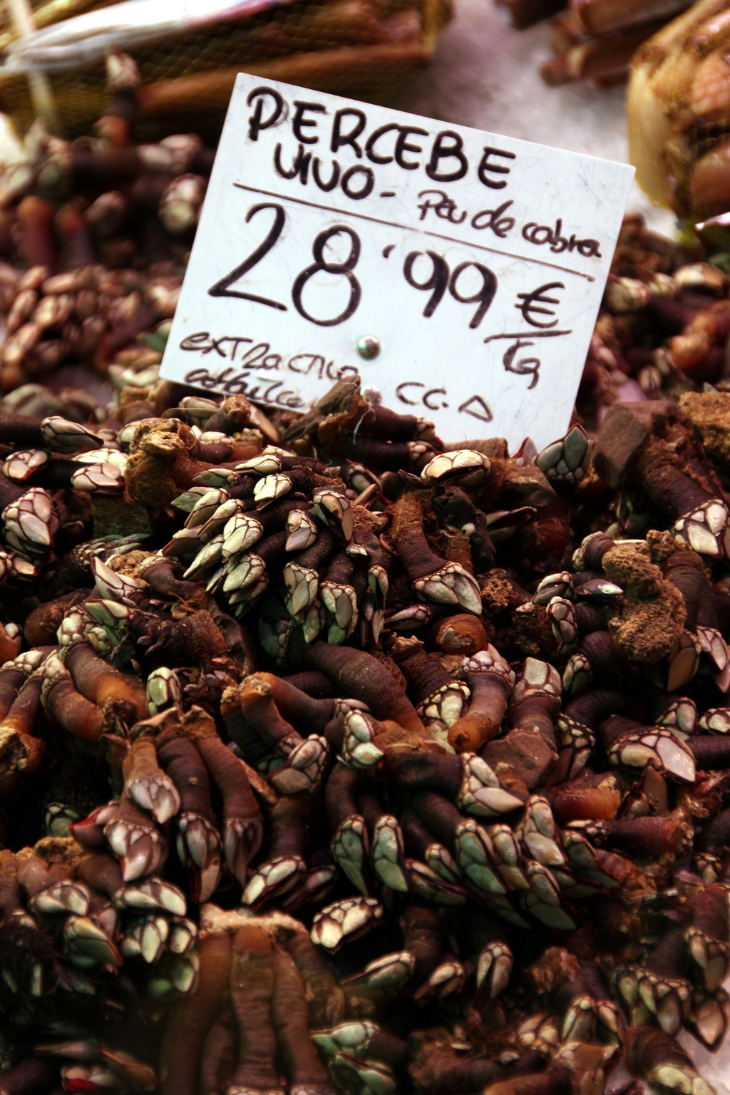 Venta de percebes para su consumo.